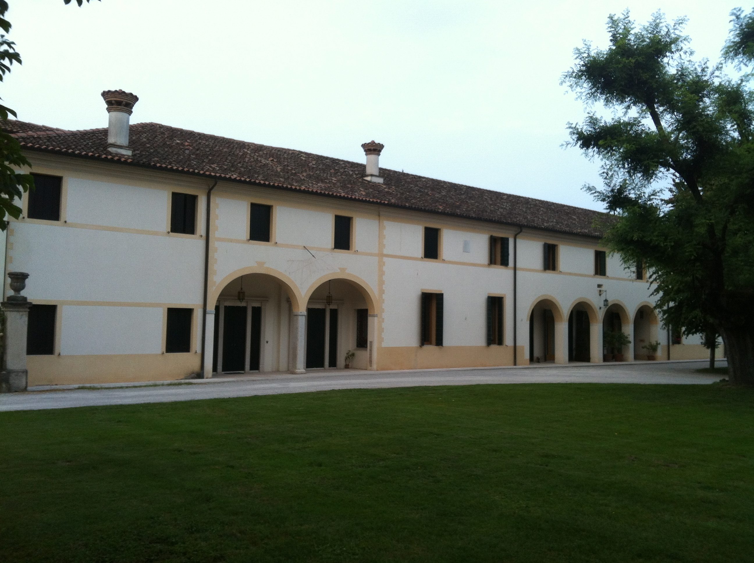 Vista barchesse